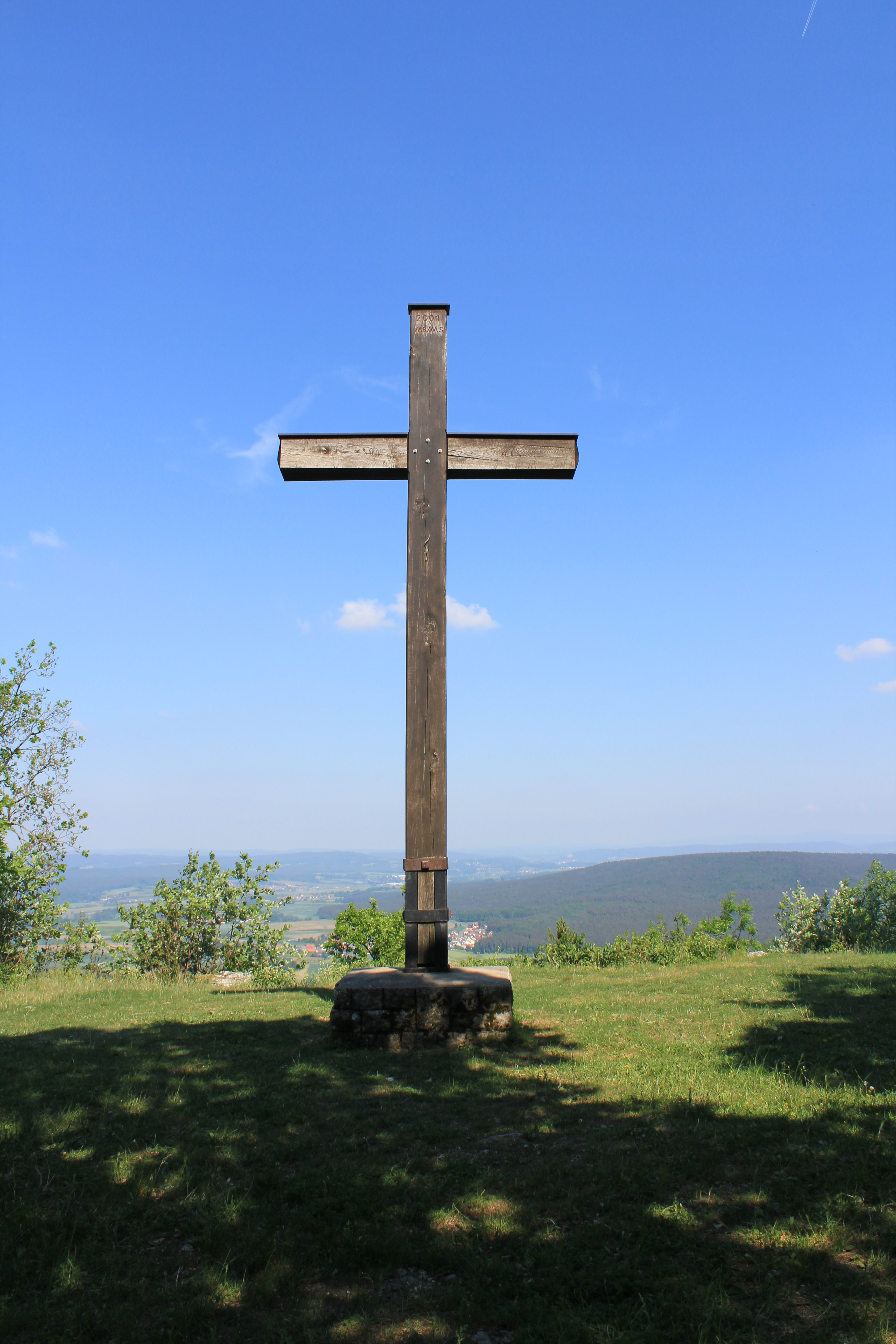 Das Gipfelkreuz des Großen Kordigasts mit Talblick im Hintergrund